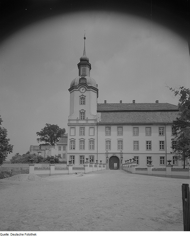 Original image description from the Deutsche Fotothek Lieberose. Schloß, Westflügel, Uhrturm mit Rampe und Durchfahrt